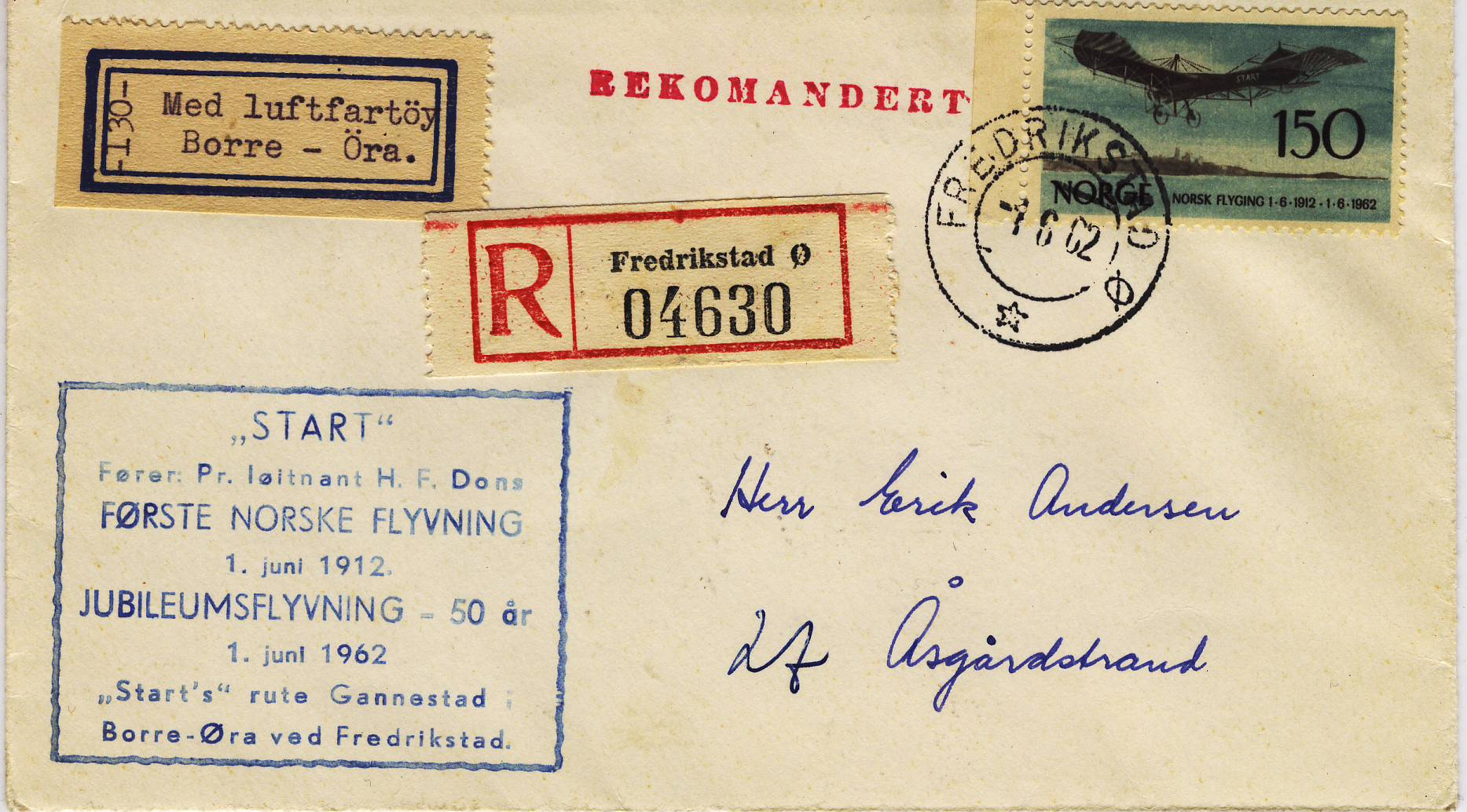 50 årsjubileet for flyturen med "Start" ble i 1962 ble markert med eget frimerke. Horten Filatelistklubb sørget for at 200 spesialstemplede konvolutter ble med på flyturen fra Borre til Fredrikstad.